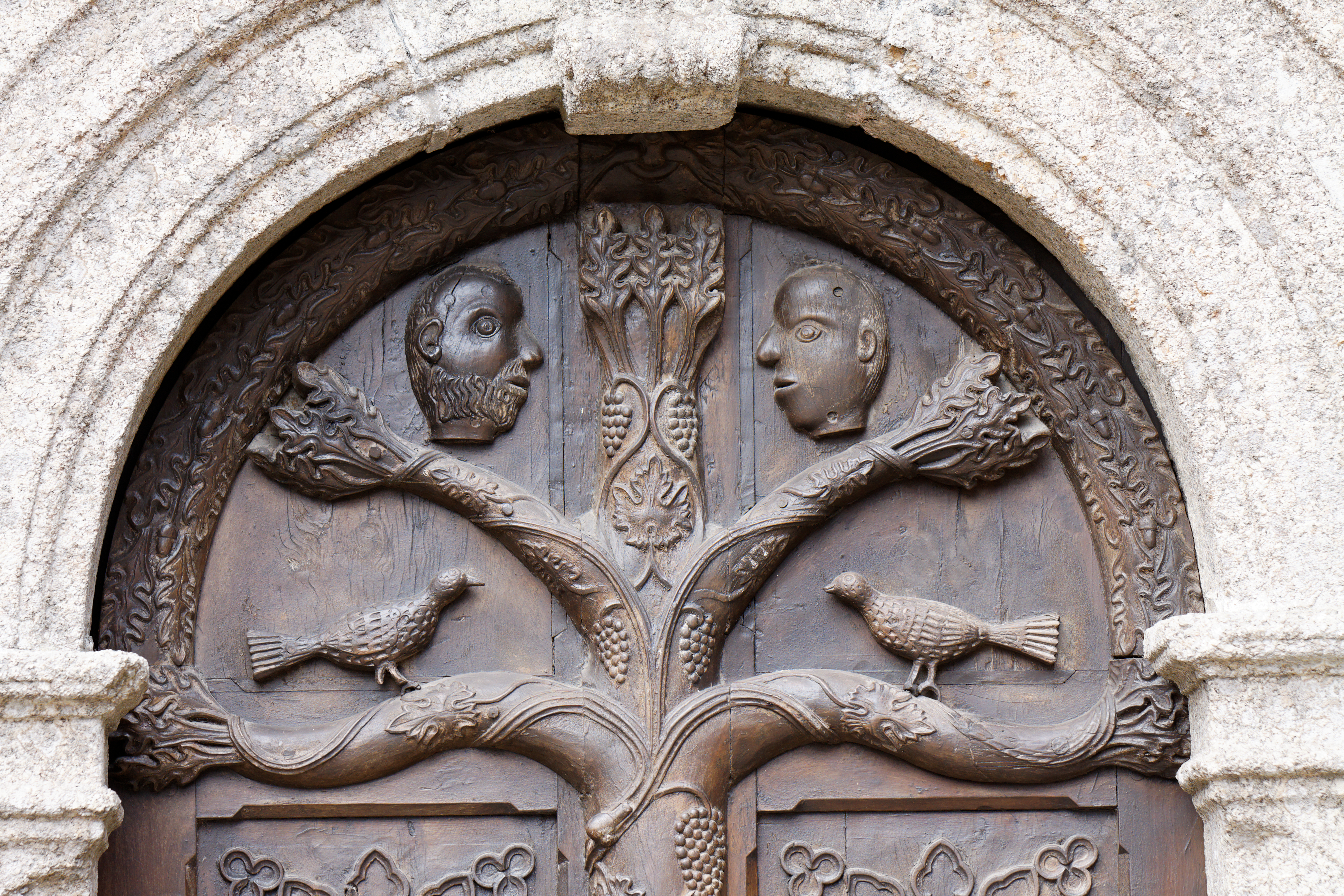 Détail de la porte de l'ossuaire. .